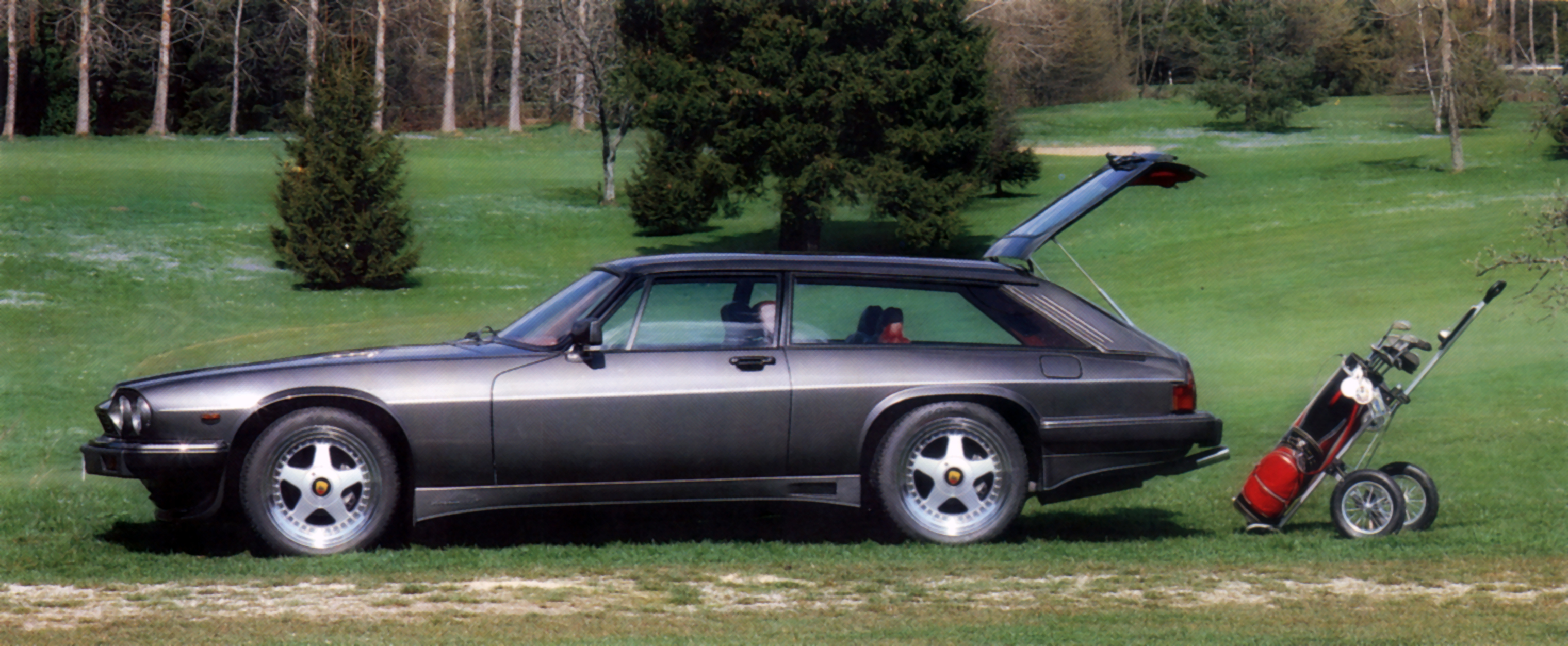 1986, Arden Werksfoto Fotograf: Heinz Holzbach